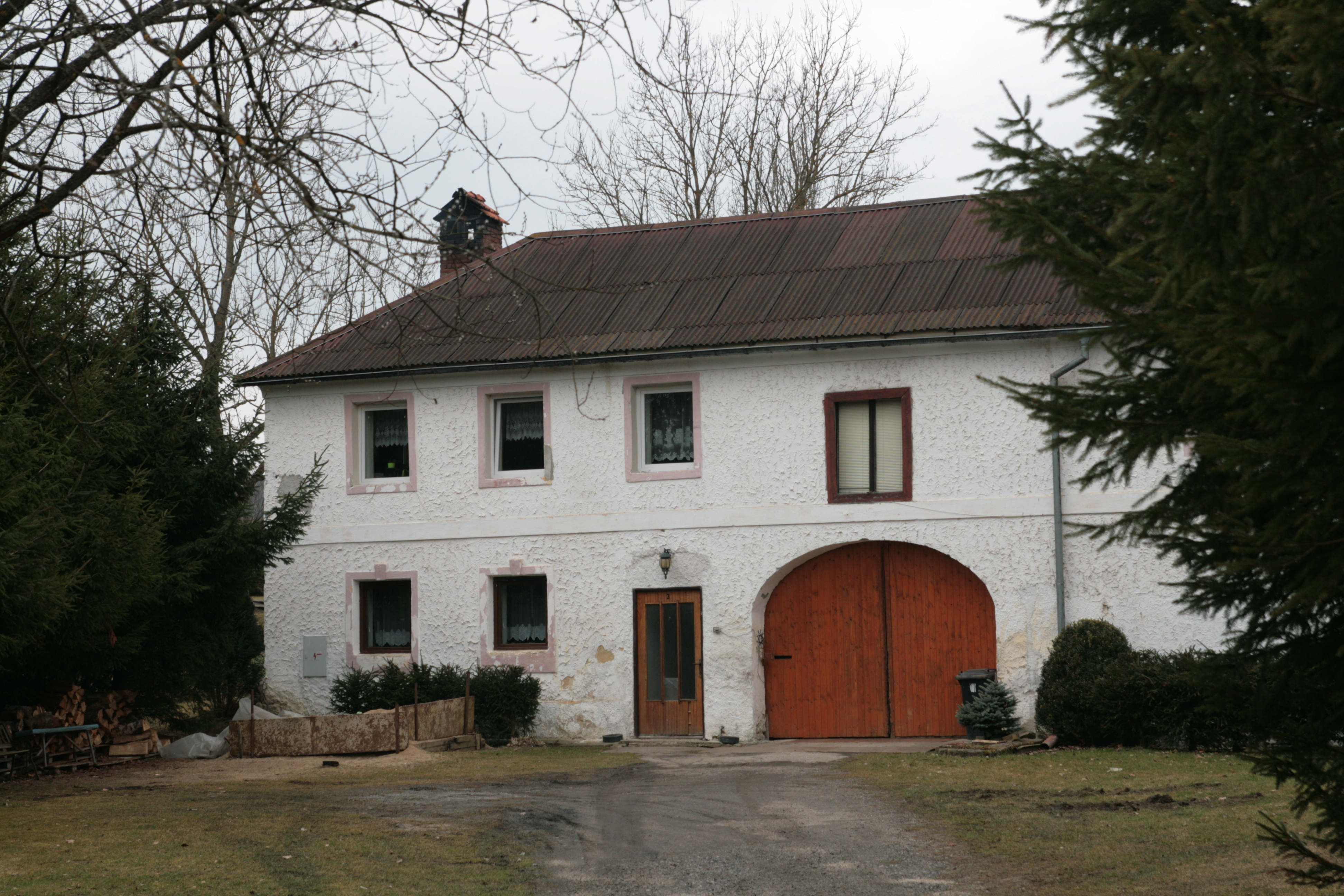 Vesnice Mostky, část města Kaplice v okrese Český Krumlov. Statek č. 3 v jihozápadní části vsi.